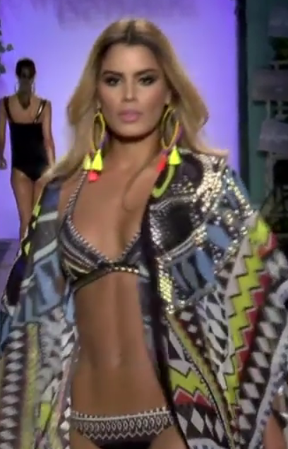 Ariadna Gutierrez en la pasarela Agua Bendita en Colombiamoda 2016